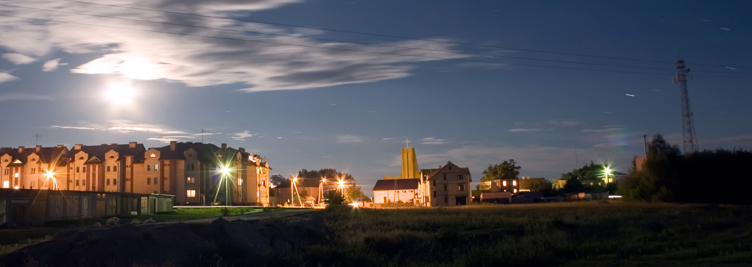 Miejscowość Cyców nocą.